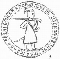 Печатка Б. Хмельницького 1654–1657